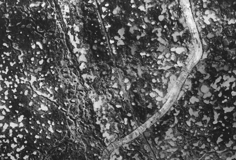 Flandern, Trichterfeld (Luftbild) ADN-ZB/Archiv I. Weltkrieg 1914-1918 Westeuropaeischer Kriegsschauplatz: Trichterfeld in Flandern. (Deutsche Fliegeraufnahme aus 200 Meter Hoehe) [Belgien, Flandern.- Luftaufnahme eines Schlachtfelds mit Bombenkratern]